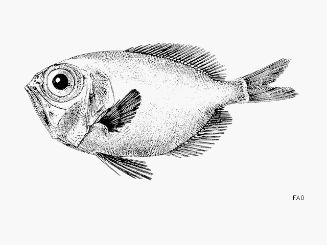 Malcarado de Parin (Diretmichthys parini)